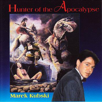 Okładka albumu muzycznego "Hunter Of The Apocalypse" (1993) wydanego przez Marka Kubskiego